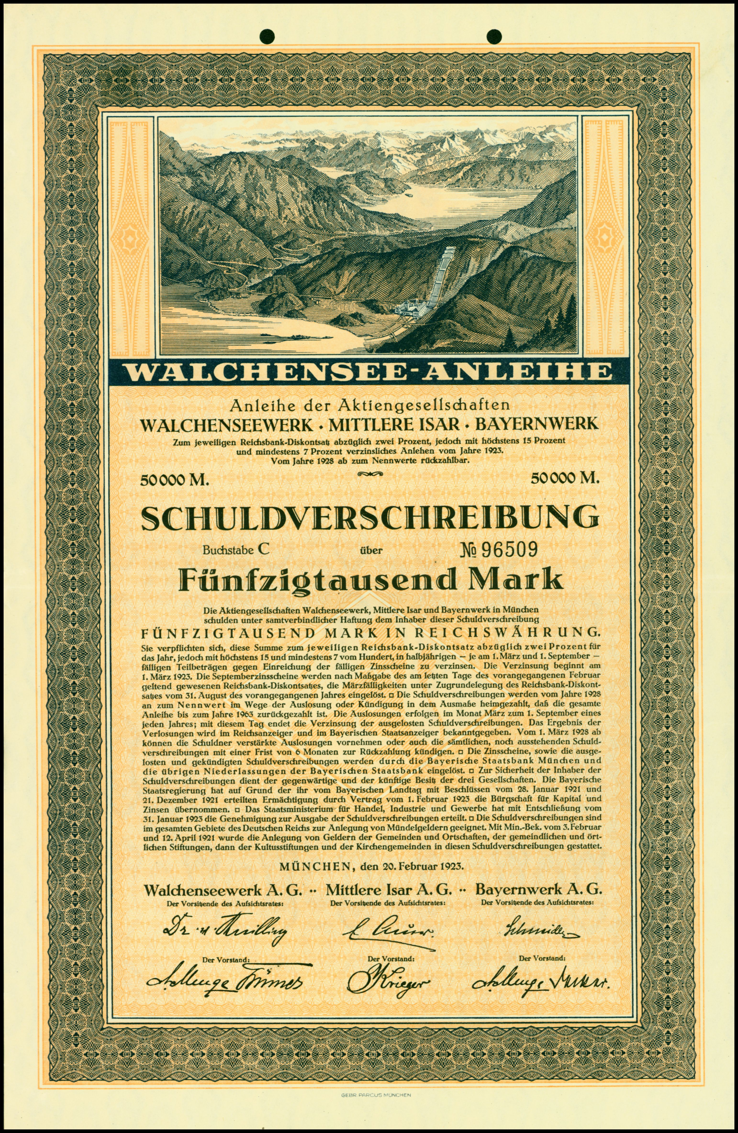 Walchensee-Anleihe über 50000 Mark vom Februar 1923; aus dem Fundus des Ersten Deutschen Historic-Actien-Museum e.V. (EDHAM), Kürnbach